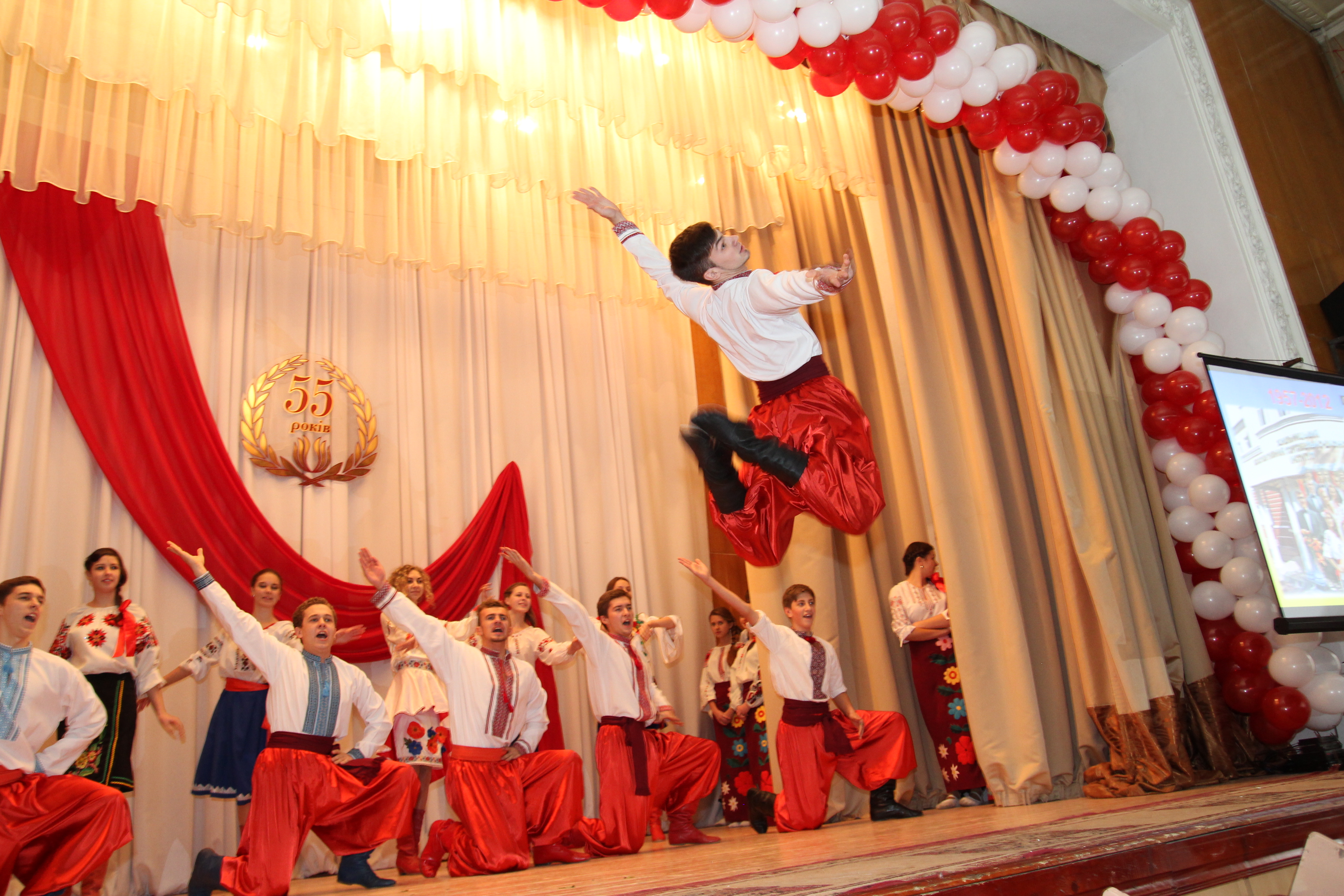 Український гопак у виконанні хореографічної студії "Модерн" - листопад 2012 року